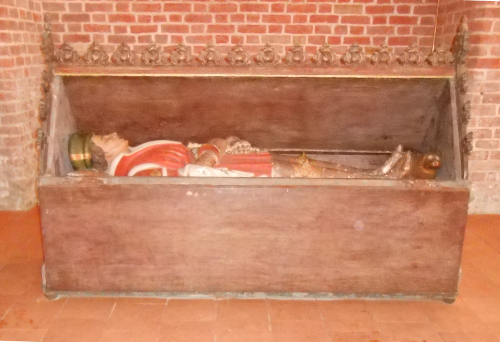 geöffneter Kenotaph für Barnim VI. in der Marienkirche zu Kenz